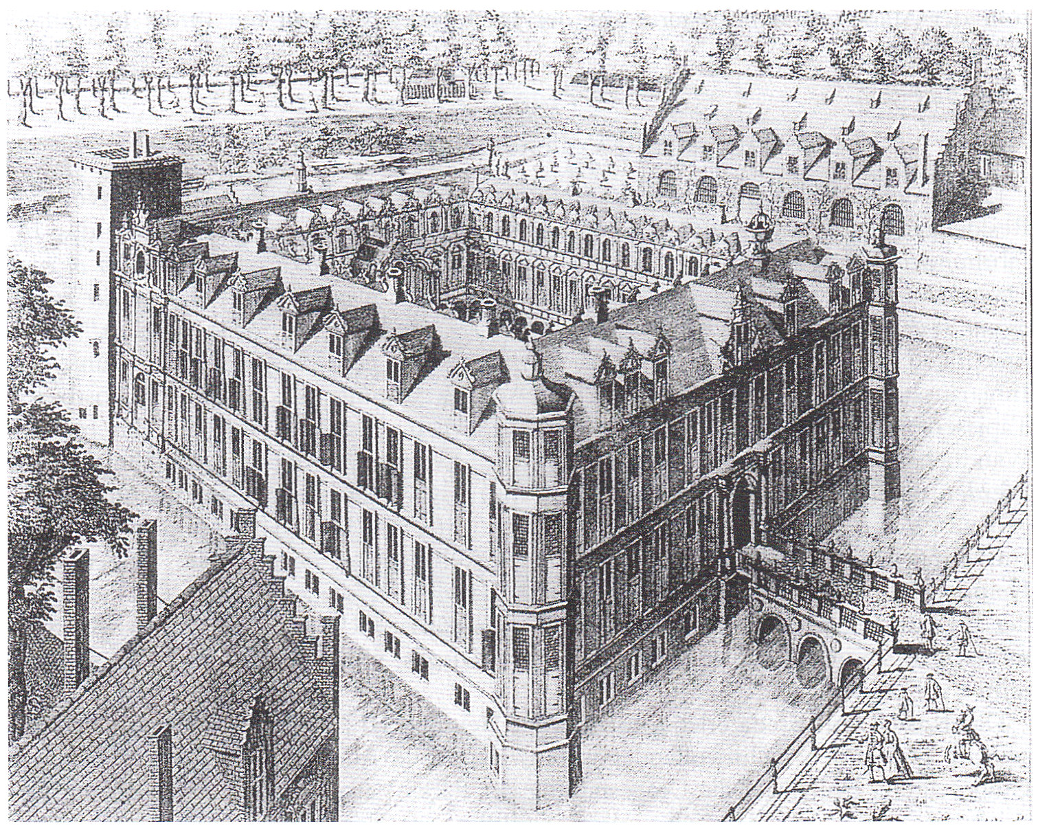 Schloss Breda 1743. Gravur von B. F. Immink nach P. de Swart.